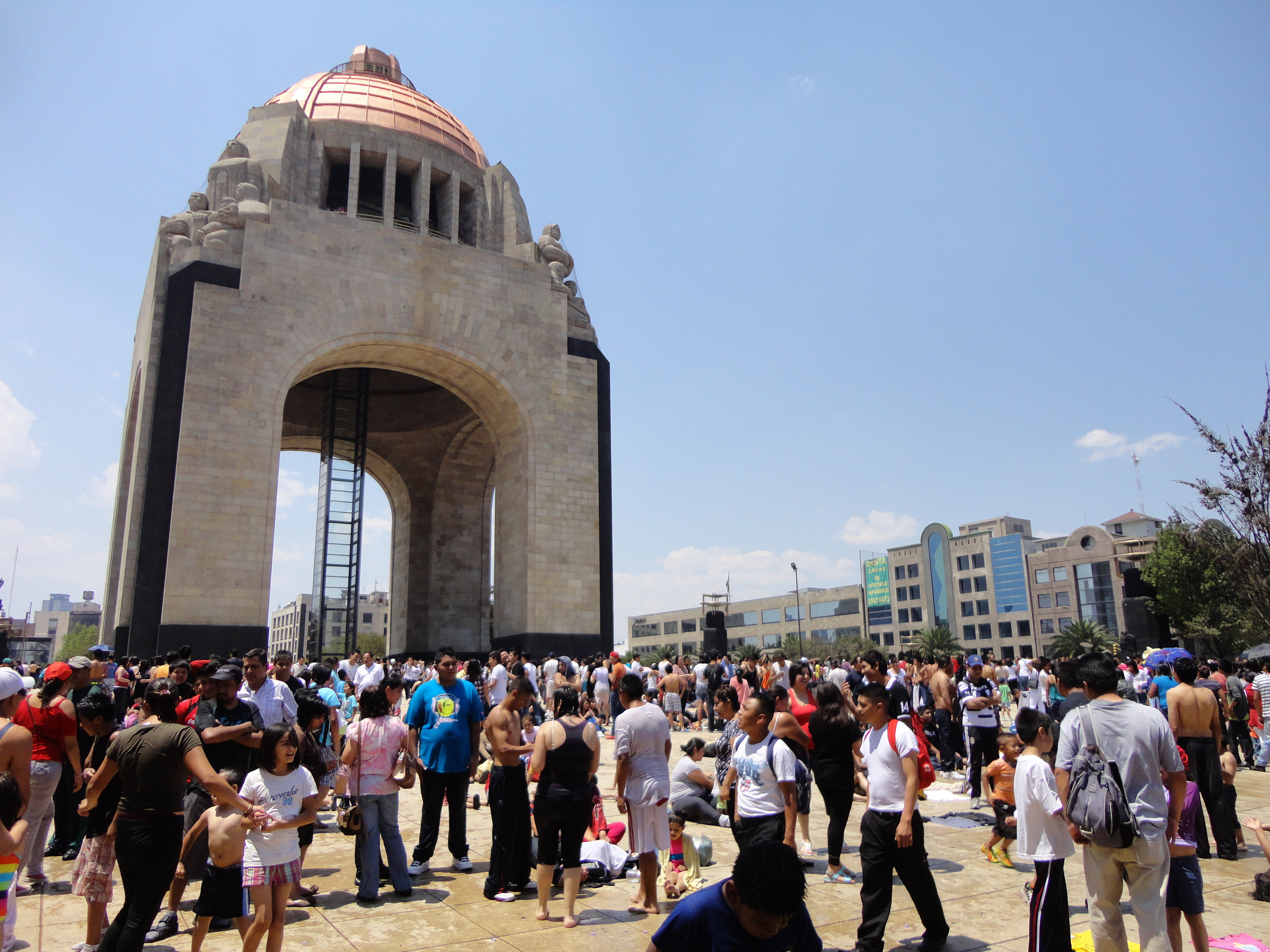 Monumento a la Revolución en un día caluroso, Ciudad de México.